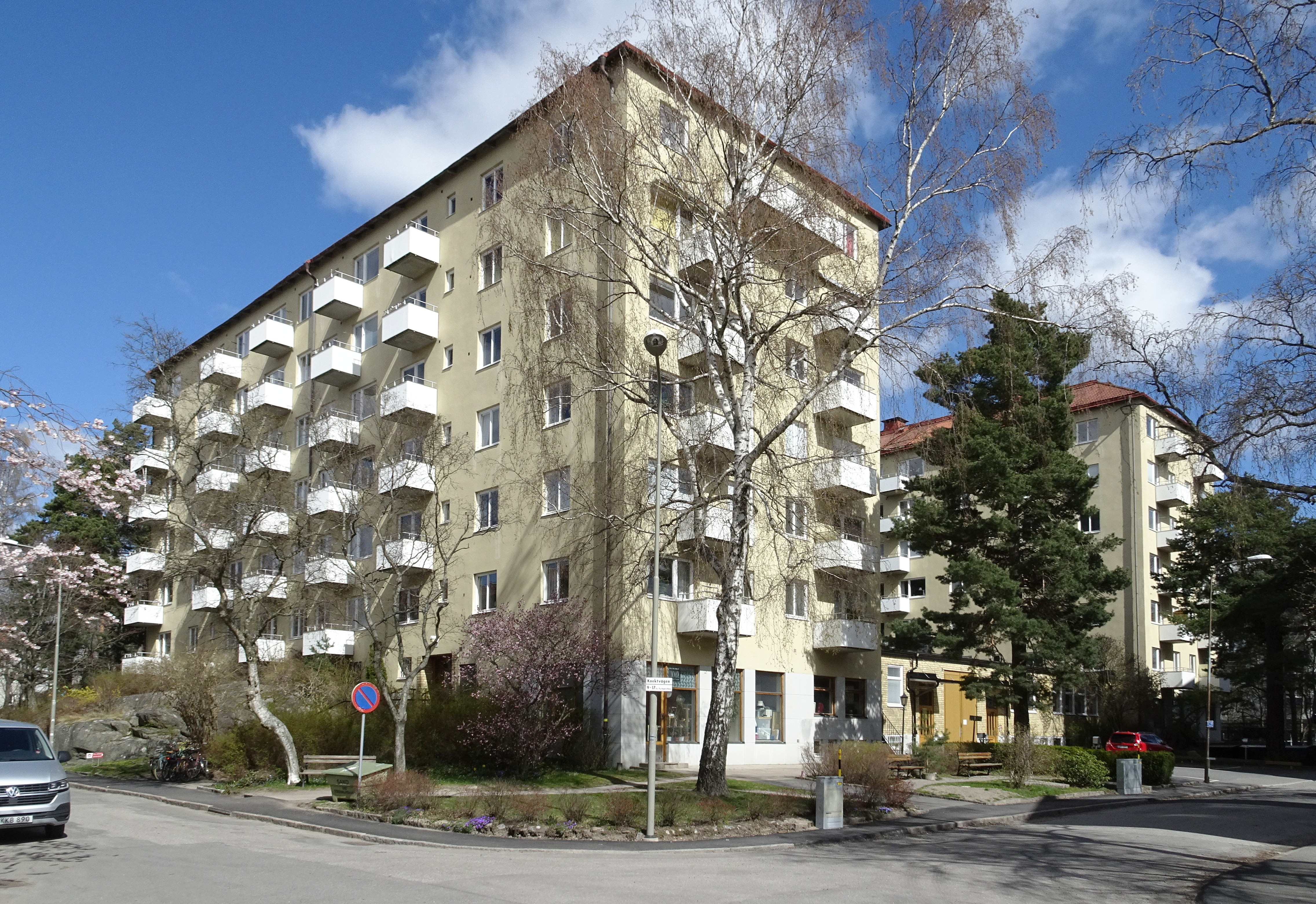 Kvarteret Fyrkantsfilen i Gubbängen. Byggår 1947 - 1948. Fackföreningarnas byggnadsproduktion (Byggmästare), Nils Hjelm (Arkitekt), Riksbyggens Bostadsrättsförening Stockholmshus nr 11 (Byggherre)